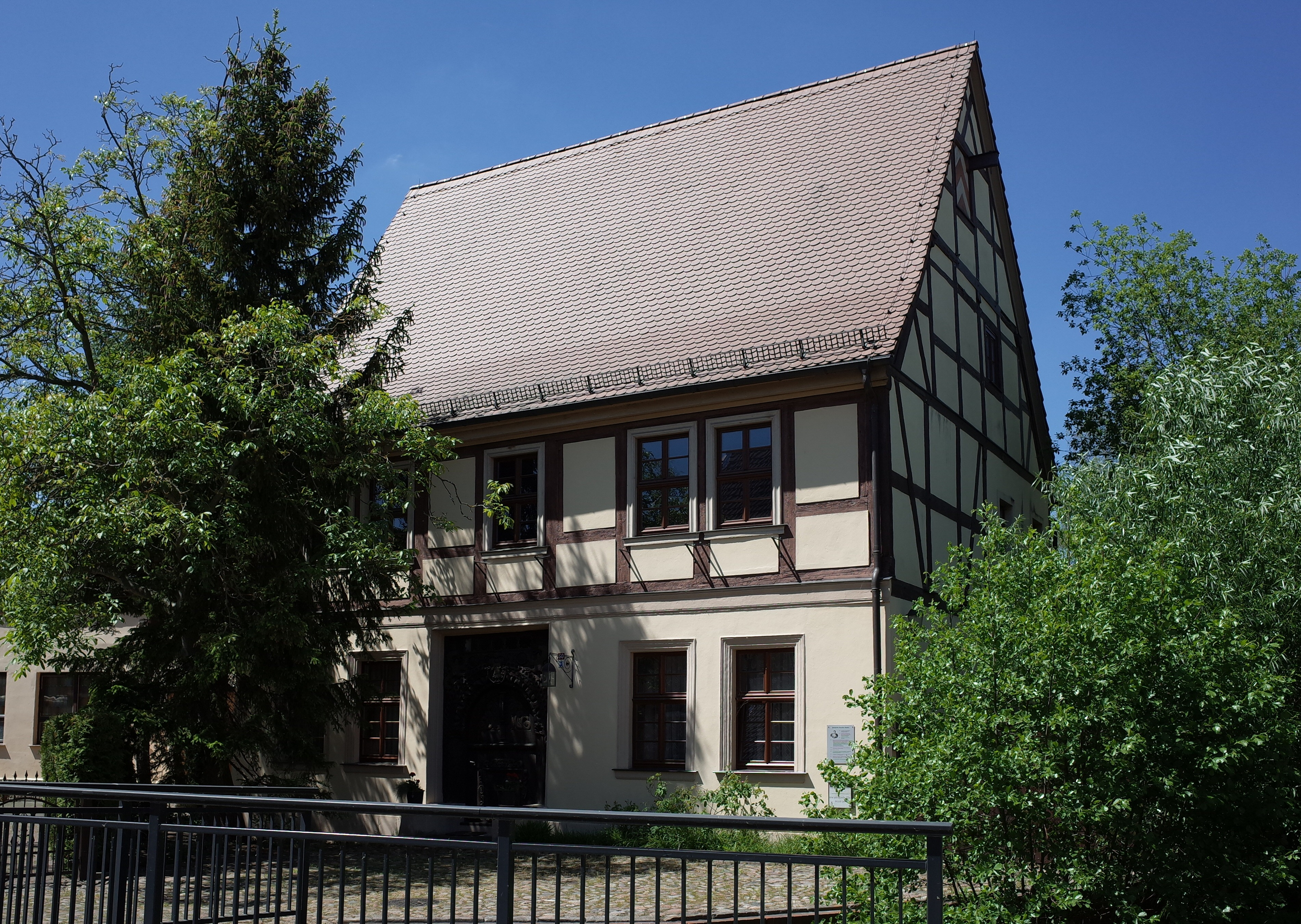 Zerbst/Anhalt, Mühlenbrücke 60.